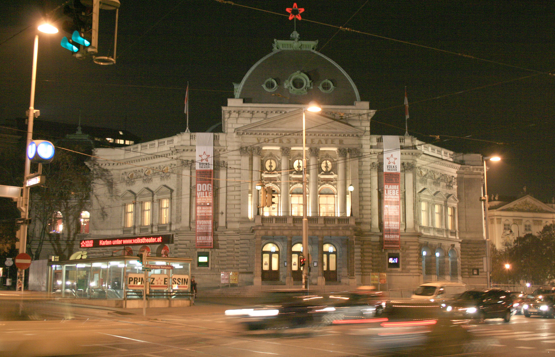 Wiener Volkstheater